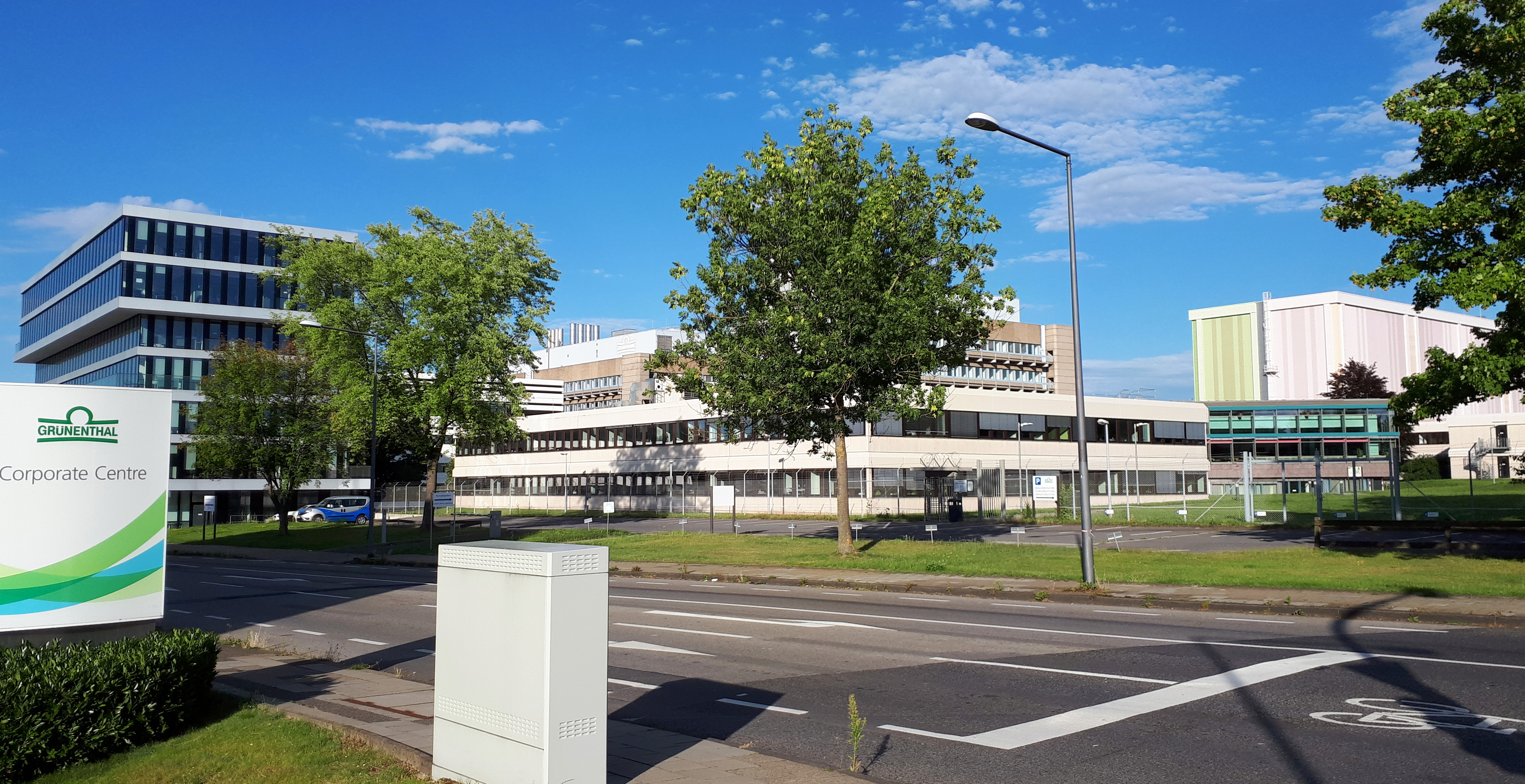 Grünenthal Zentrale Aachen-Eilendorf